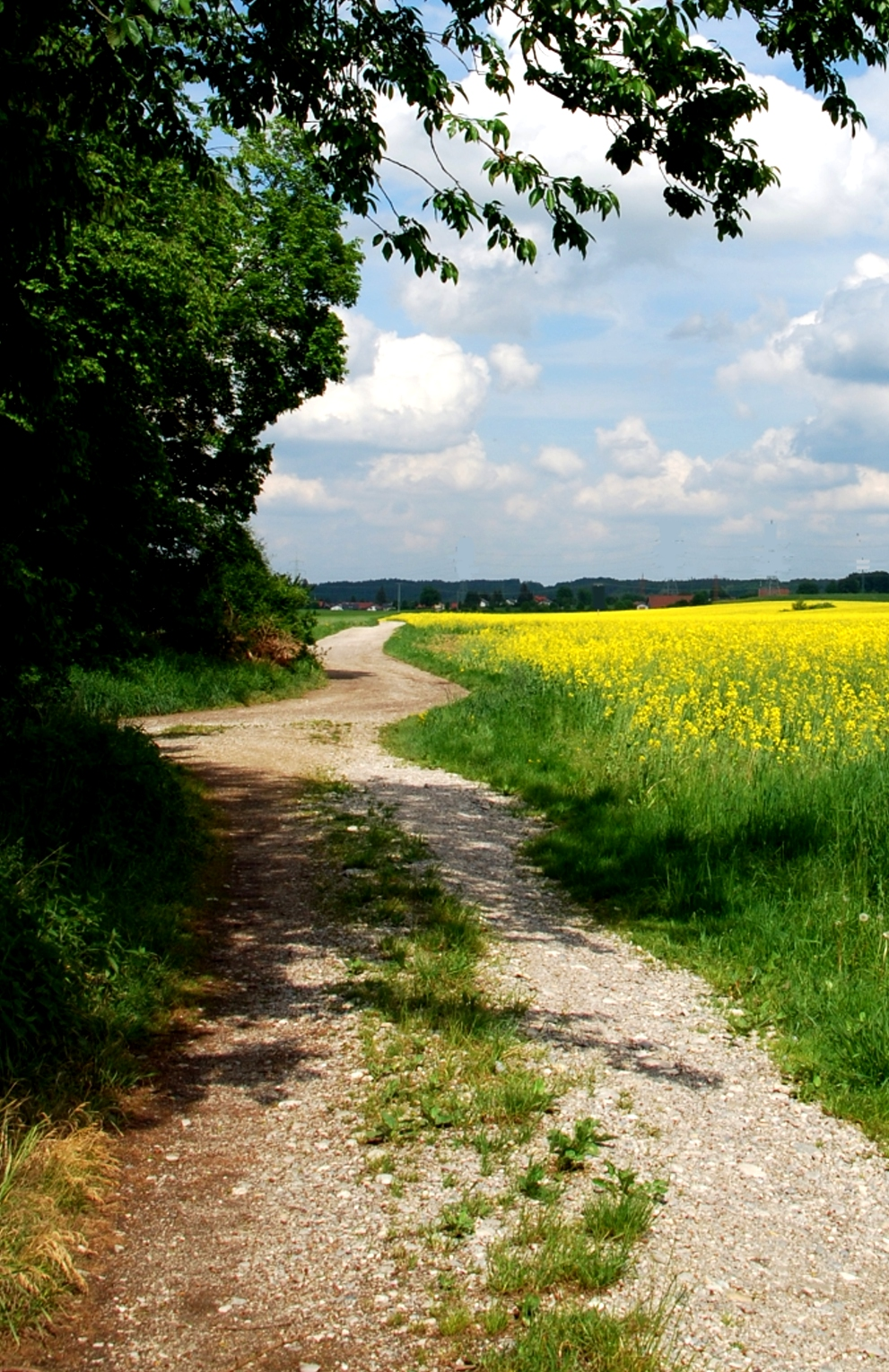 Starnberg, OT Landstetten. Straße der römischen Kaiserzeit, Teilstück der Trasse Kempten–Gauting.